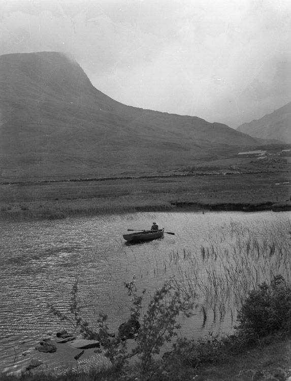 Teitl Cymraeg/Welsh title: Ymweliad a Rhyd-Ddu, bro T H Parry-Williams. Ffotograffydd/Photographer: Geoff Charles (1909-2002) Dyddiad/Date: 19/06/1958 Cyfrwng/Medium: Negydd ffilm / Film negative Cyfeiriad/Reference: (gch19231) Rhif cofnod / Record no.: 3469987 Rhagor o wybodaeth am gasgliad Geoff Charles yn Llyfrgell Genedlaethol Cymru More information about the Geoff Charles Collection at the National Library of Wales Mae ffotograffau Geoff Charles hefyd yn rhan o Broject Europeana Libraries Geoff Charles' photographs also form part of the Europeana Libraries Project